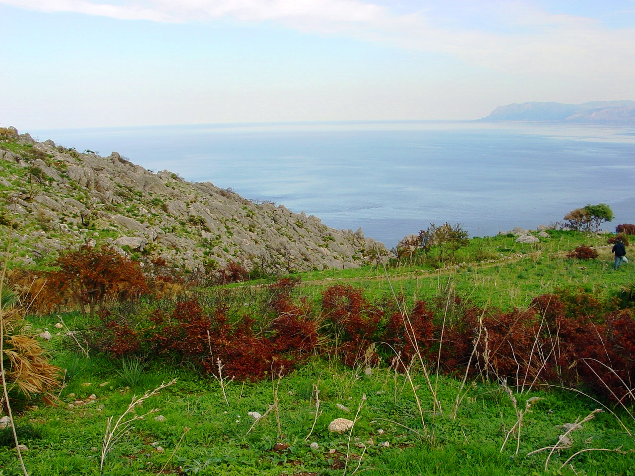 Riserva naturale dello Zingaro, Sicily